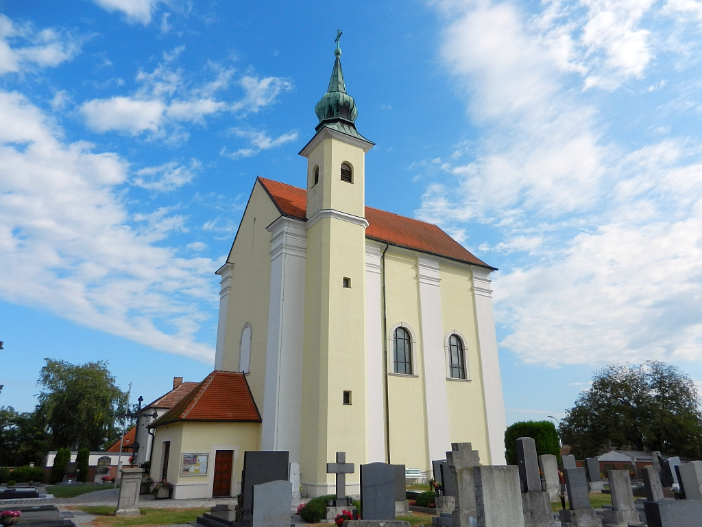 Kath. Pfarrkirche hl. Jakob der Ältere in Regelsbrunn.